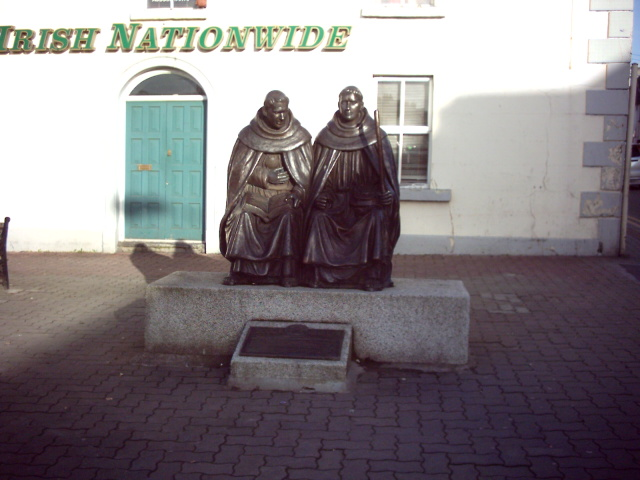 Statue à Mullingar